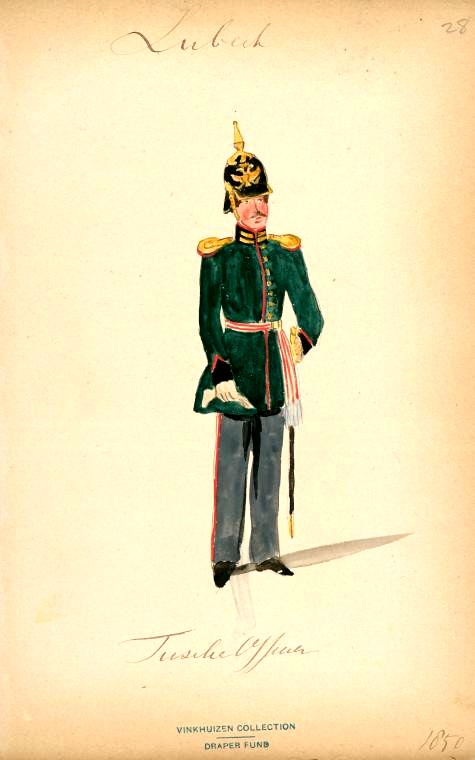 Offizier des Lübecker Militärs, 1850